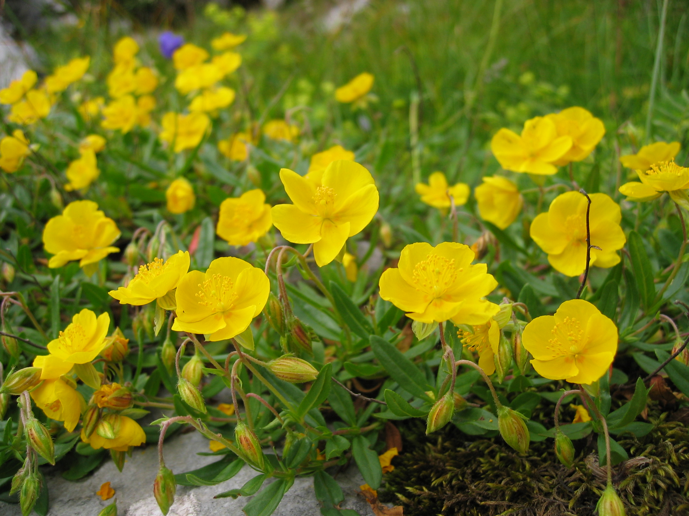 Großblütiges Sonnenröschen (Helianthemum nummularium subsp. glabrum, Syn. H. grandiflorum subsp. glabrum), Cistaceae - Dachsteinplateau, Österreich/Austria